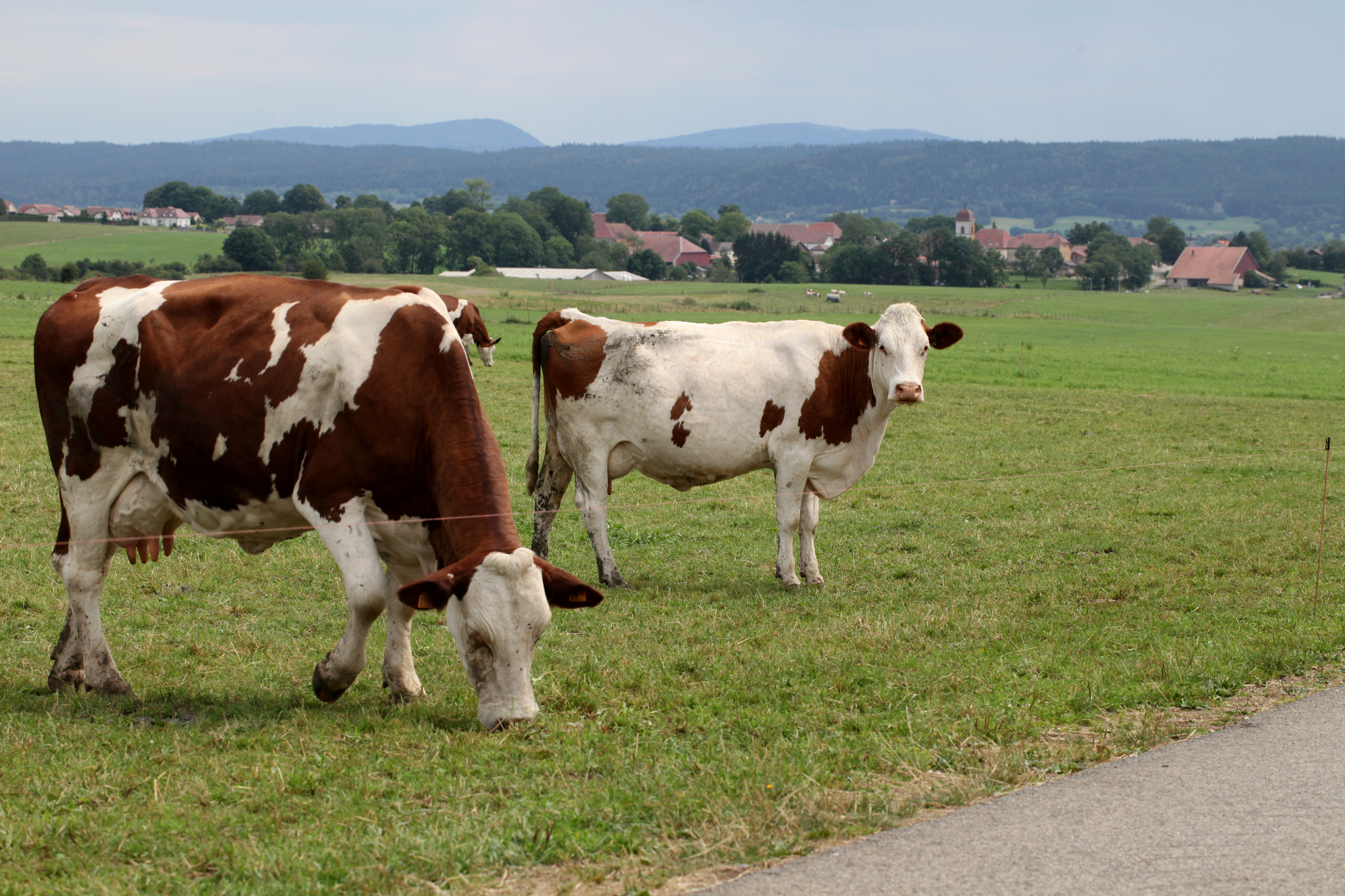 Vue de Bulle (Doubs).